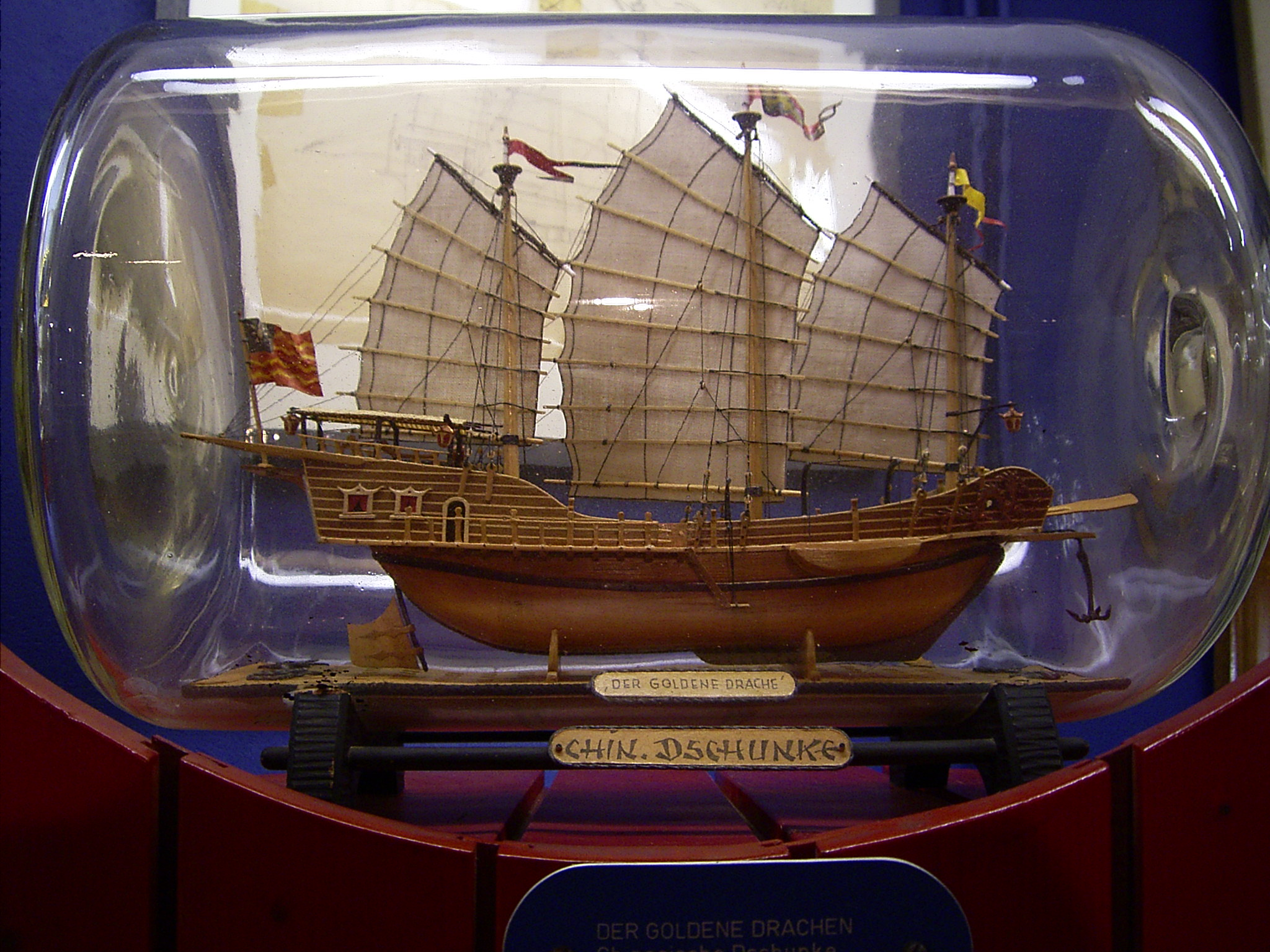 Dschunke als Buddelschiff im Buddelschiffmuseum Neuharlingersiel